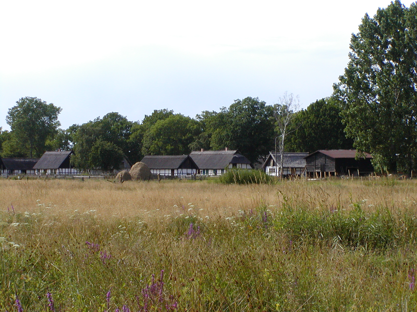 Kluki, Poland Muzeum Wsi Słowińskiej